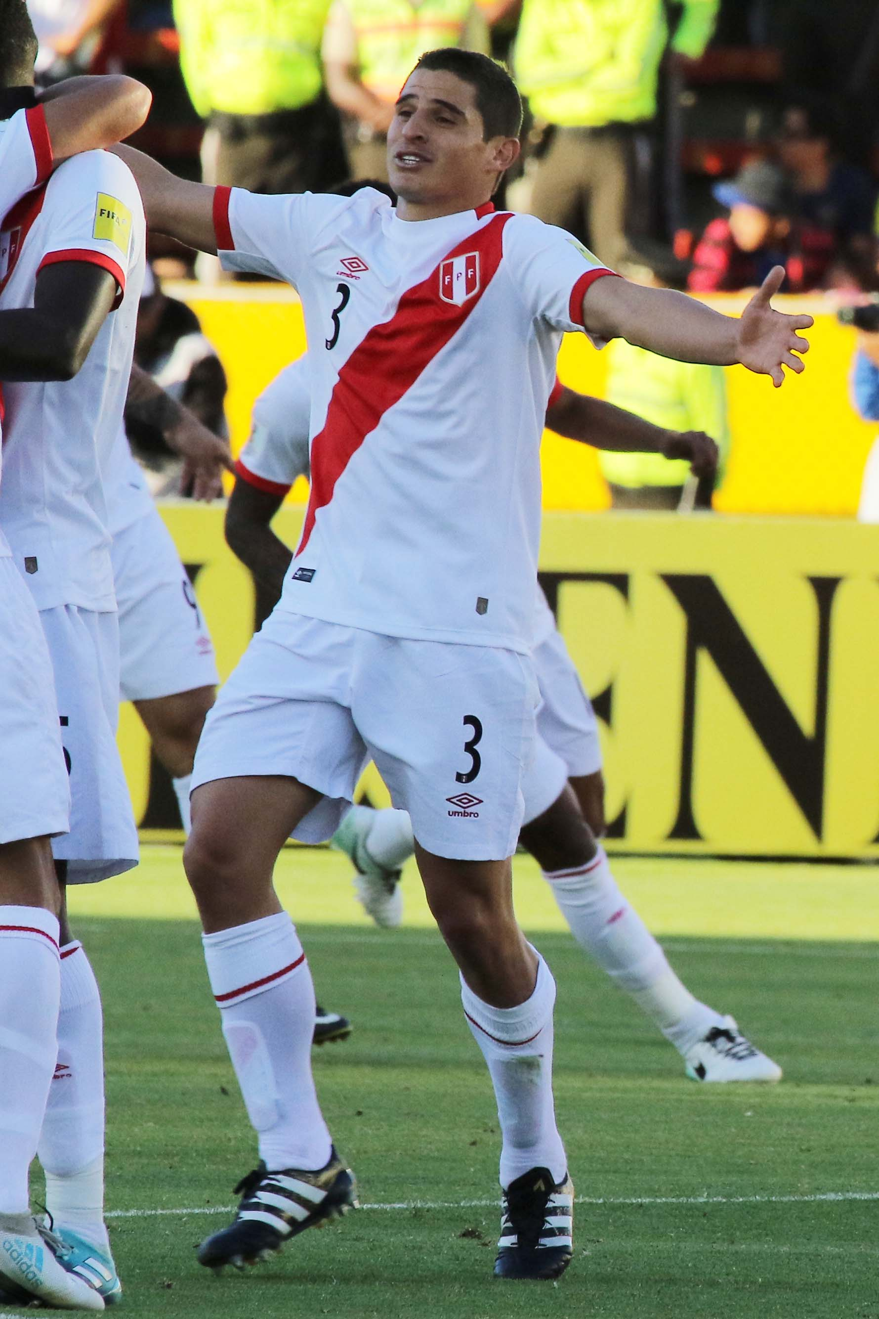 Quito 5 Sep (Andes).- Encuentro por eliminatorias Rusia 2018 entre Ecuador y Perú. Fotografías: Carlos Rodríguez/Andes.